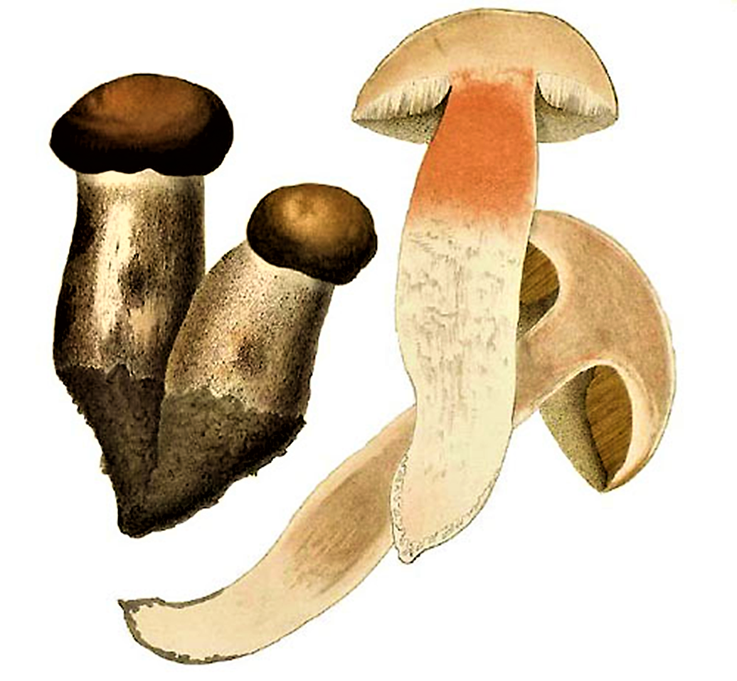 Boletus duriusculus 1874, heute Leccinum duriusculum